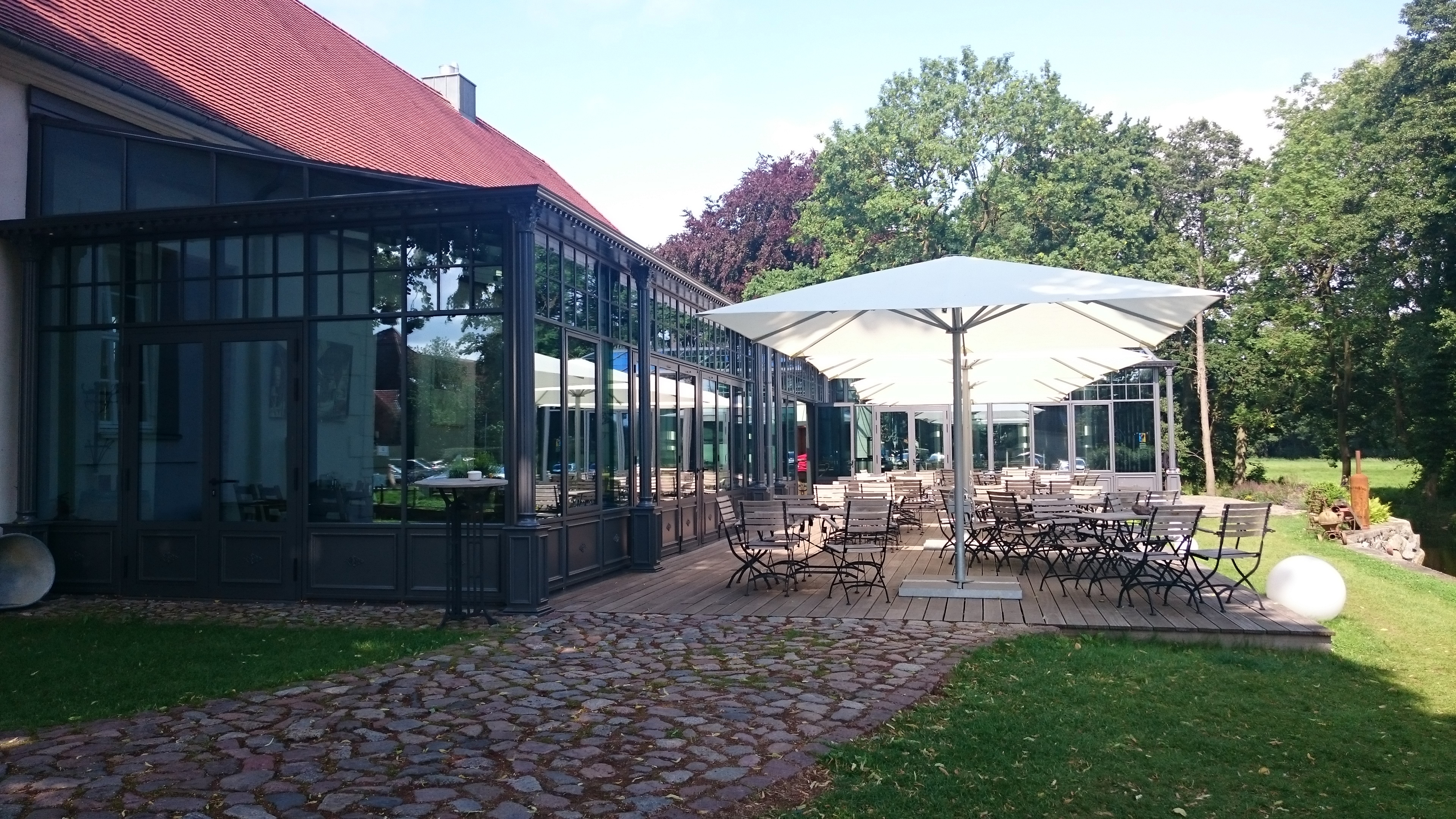 Schloss Mellenthin, Anbau der Brauerei und Terrasse für Gäste